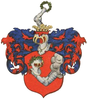 Helmerseni suguvõsa aadlivapp